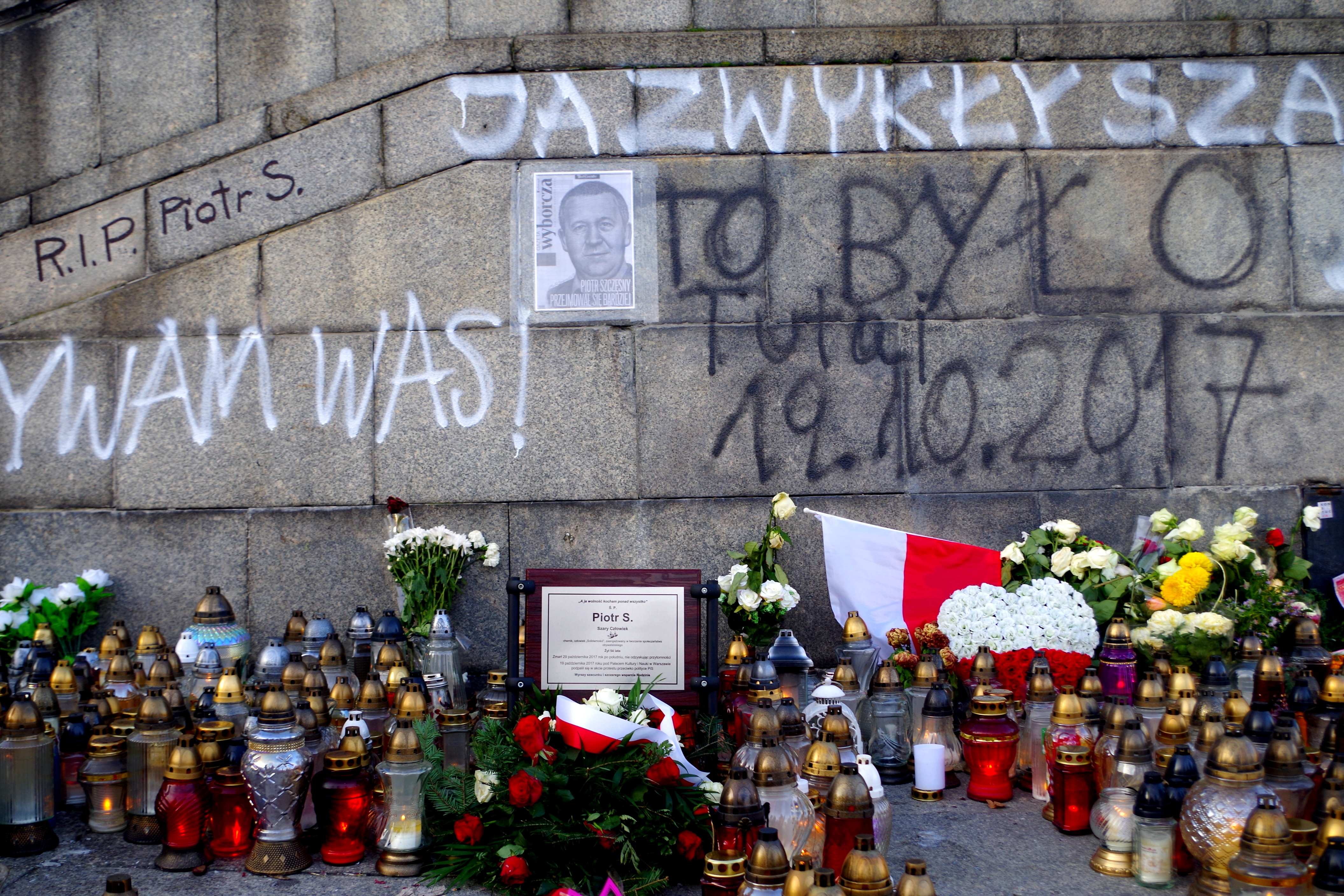 Kwiaty i znicze na Placu Defilad w Warszawie, w miejscu w którym 19 października 2017 dokonał samospalenia Piotr Szczęsny